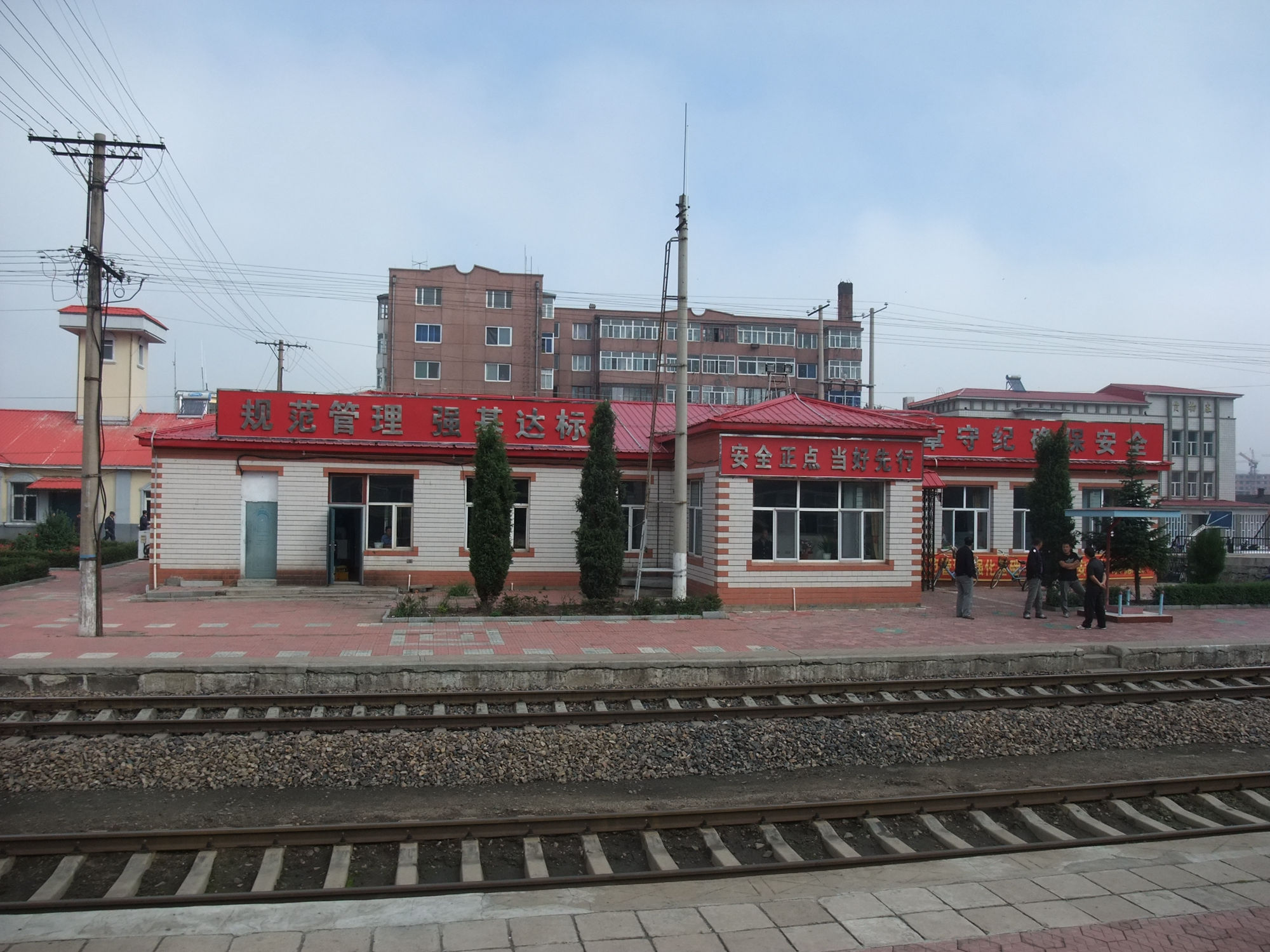 黑龙江省绥阳站